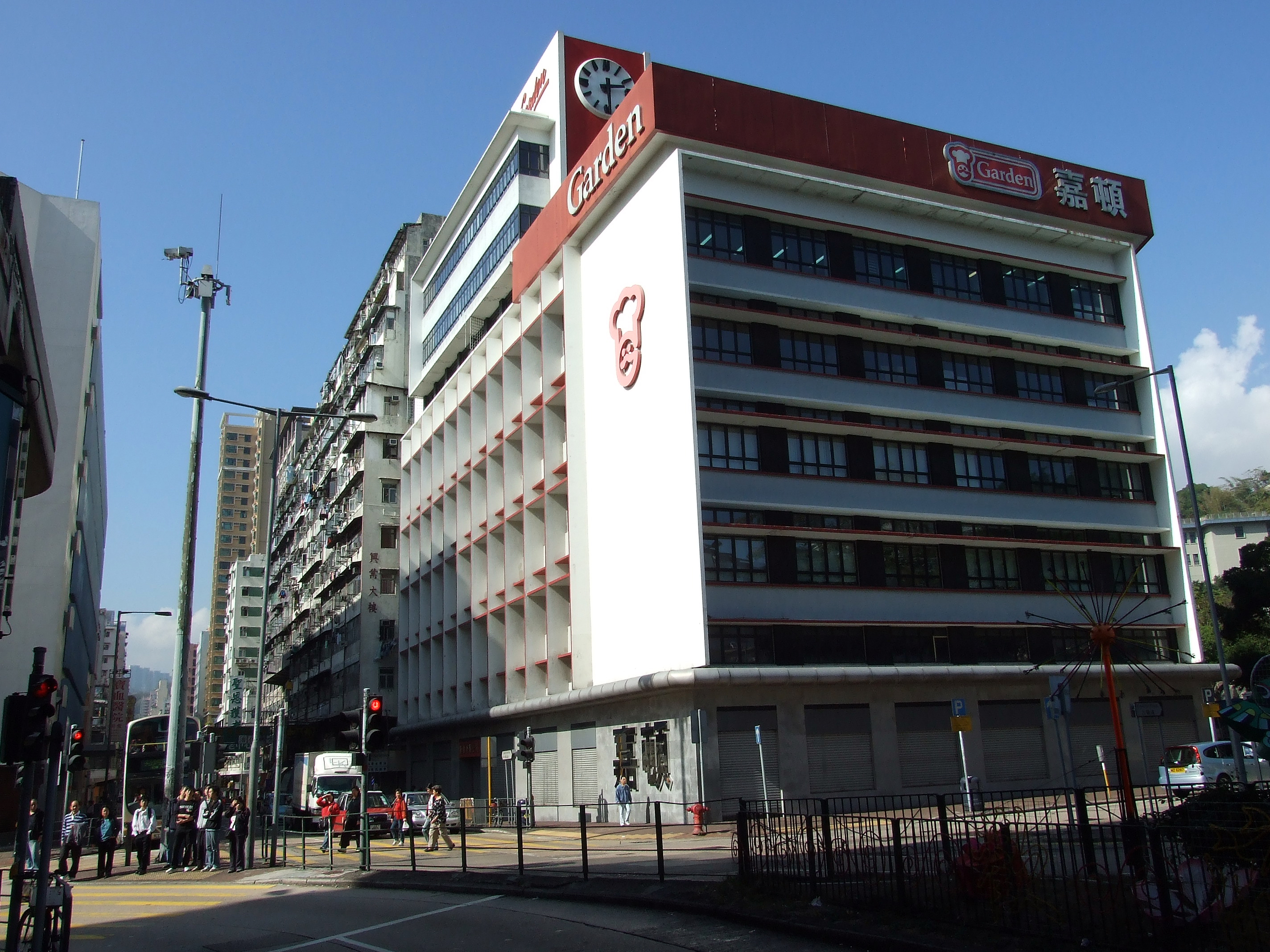 中文（香港）: 位於深水埗青山道的嘉頓烘焙中心